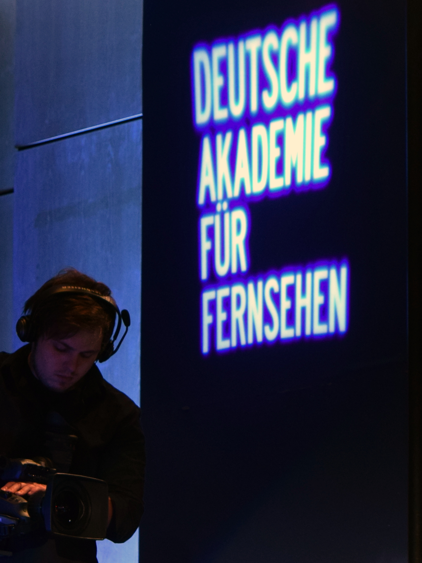 Deutsche Akademie für Fernsehen, Symposium und Preisverleihung 2015 in Köln Deutsche Akademie für Fernsehen - Symposium und Preisverleihung 2015 in Köln